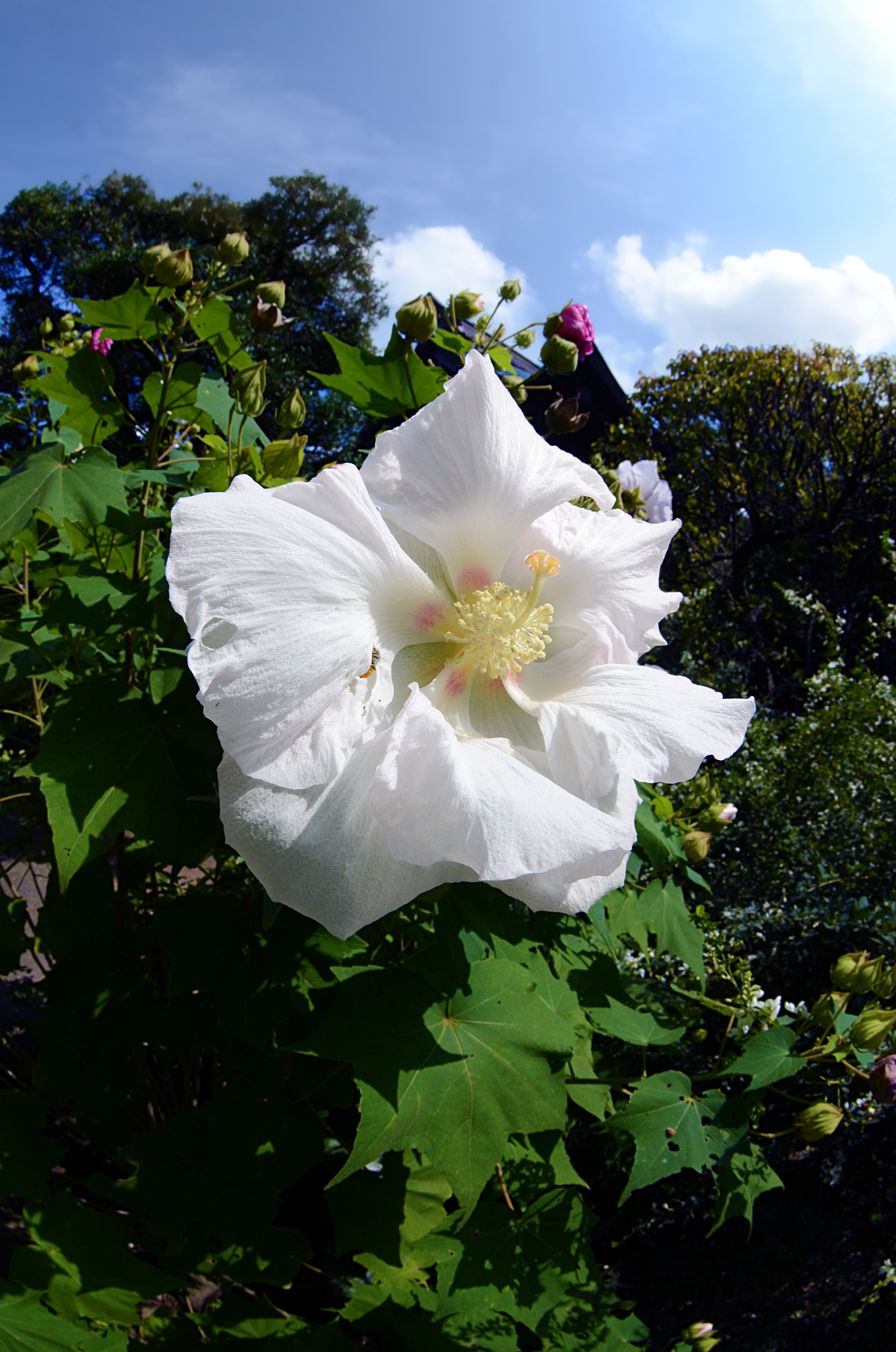 しろい芙蓉